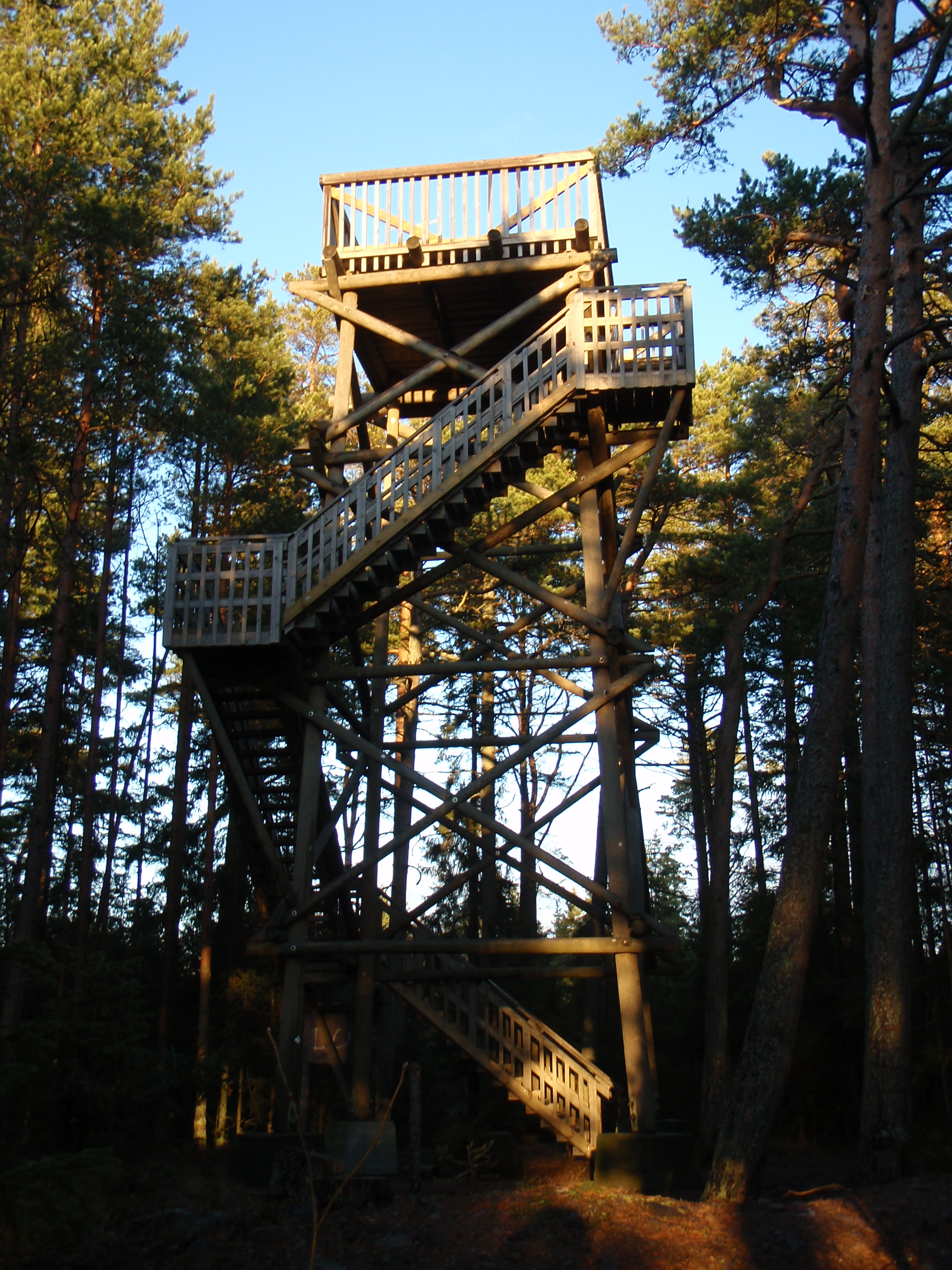 Tähystystorni Reposaaren Linnakepuistossa. Alkuperäinen torni rakennettiin vuonna 1936 tähystyksen ja ilmavalvonnan tehostamiseksi. Talvisodan aikana tornissa työskentelivät lotat ja sotilaspojat, koska Mäntyluodon satamaa pommitettiin lähes päivittäin. Vuonna 1992 koko Linnakepuistoa entisöitiin, ja nykyinen torni rakennettiin. Turvallisuussyistä uusi torni eroaa vanhasta: portaat kiertävät tornia ja kaidemateriaalina käytettiin painekyllästettyä puuta. Näköalatornin ylätasanne uudistettiin vuonna 2007 ja samalla kulkuportaat kunnostettiin. Uuden tornin korkeus merenpinnasta on 17 metriä ja maanpinnasta 12 metriä. Kirkkaalla säällä tornista näkee 22 kilometrin päähän.